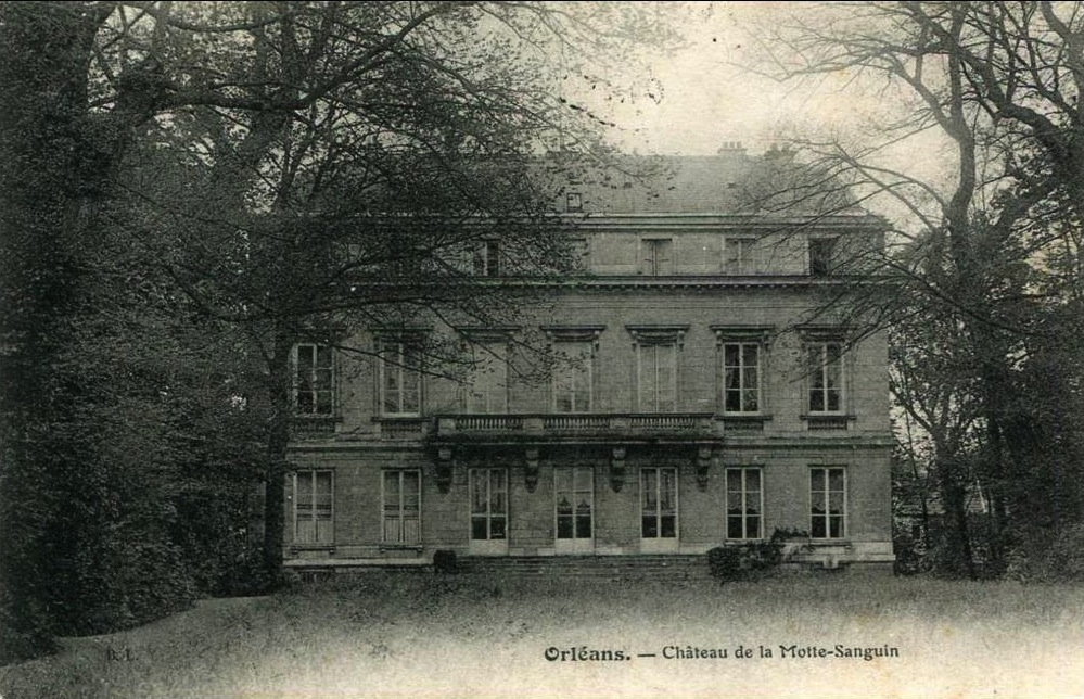 Château de la Motte-Sanguin, Orléans, Loiret, Centre, France